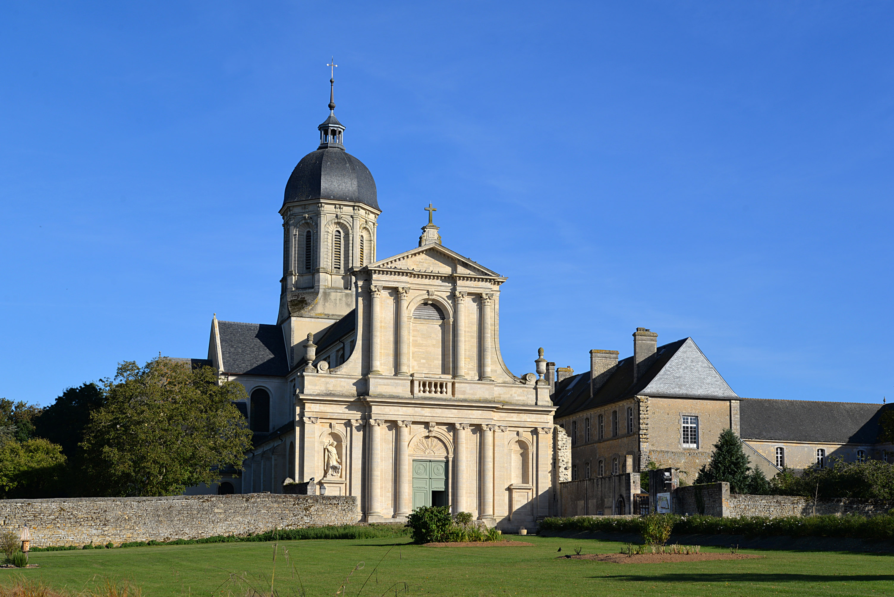 Juaye-Mondaye (Calvados)